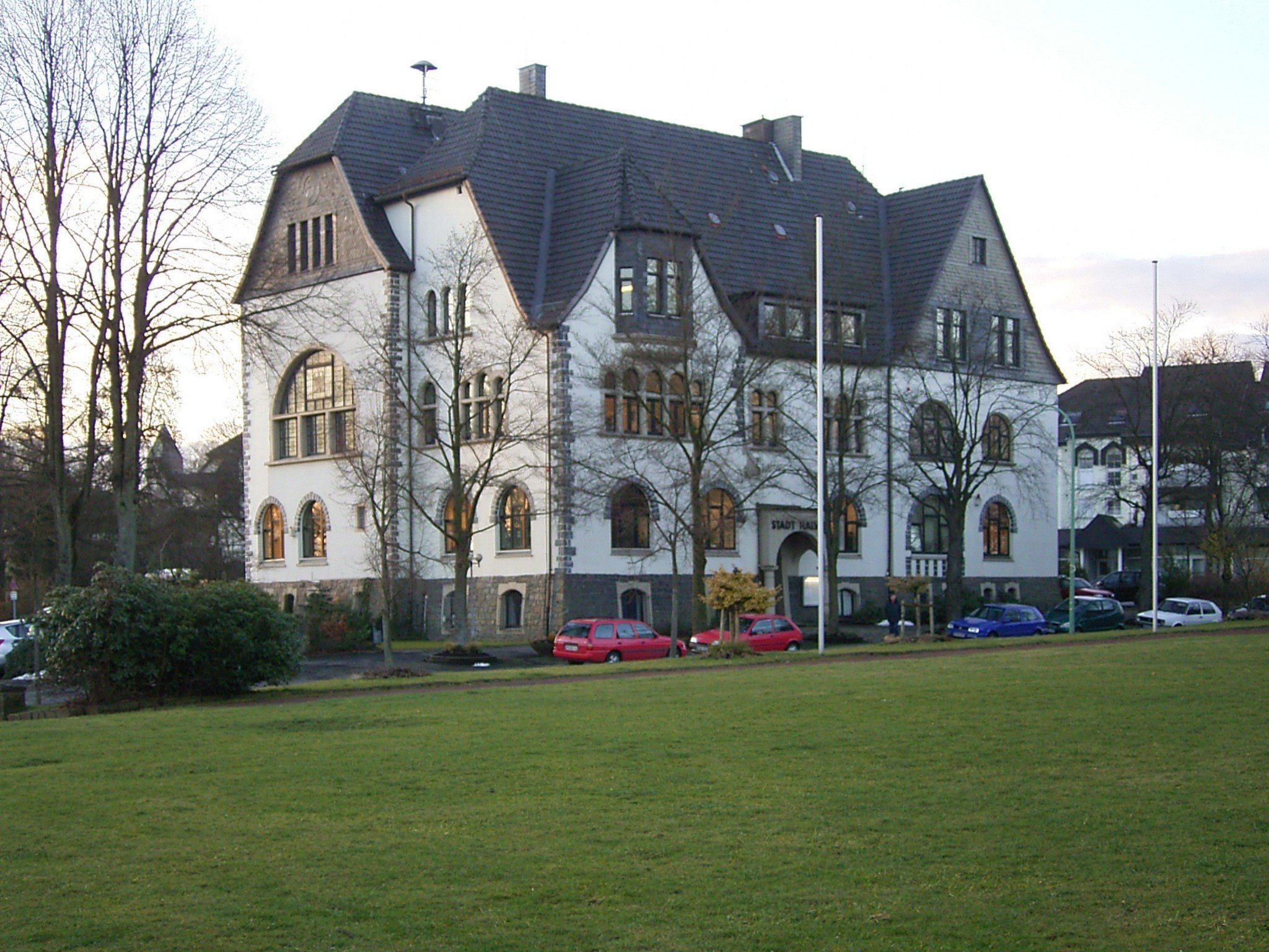 Rathaus in Halver